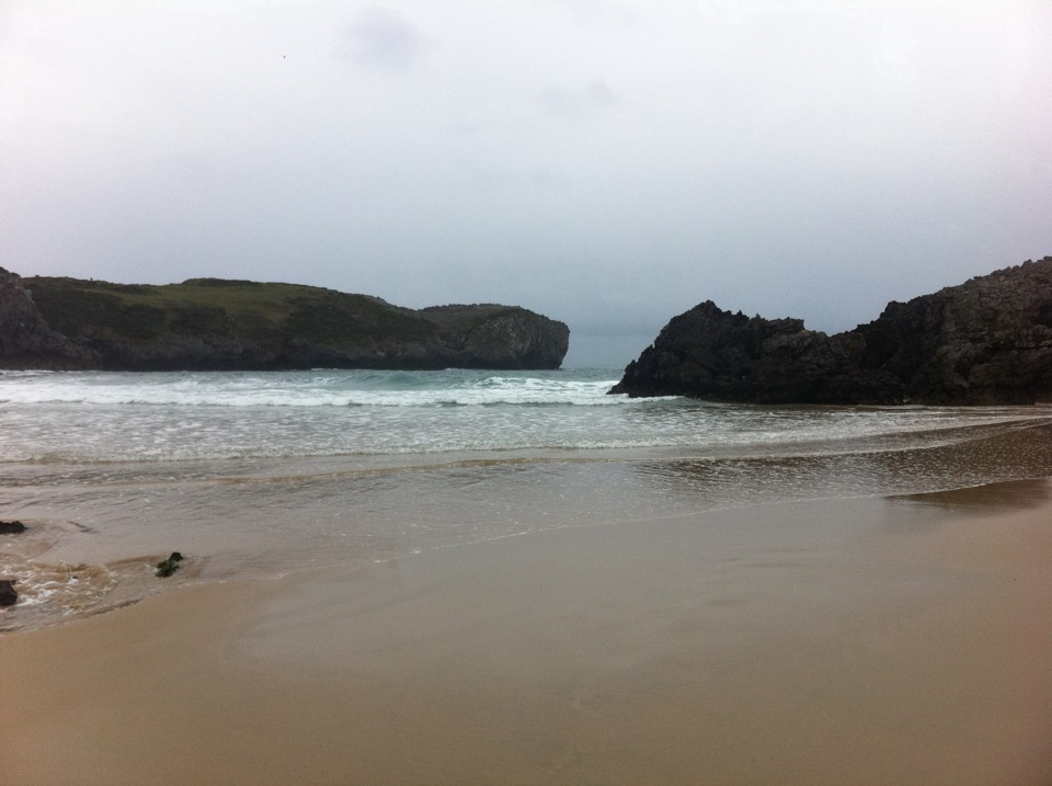 Playa de Borizu, Celoriu, LLanes (Asturias, Spain)